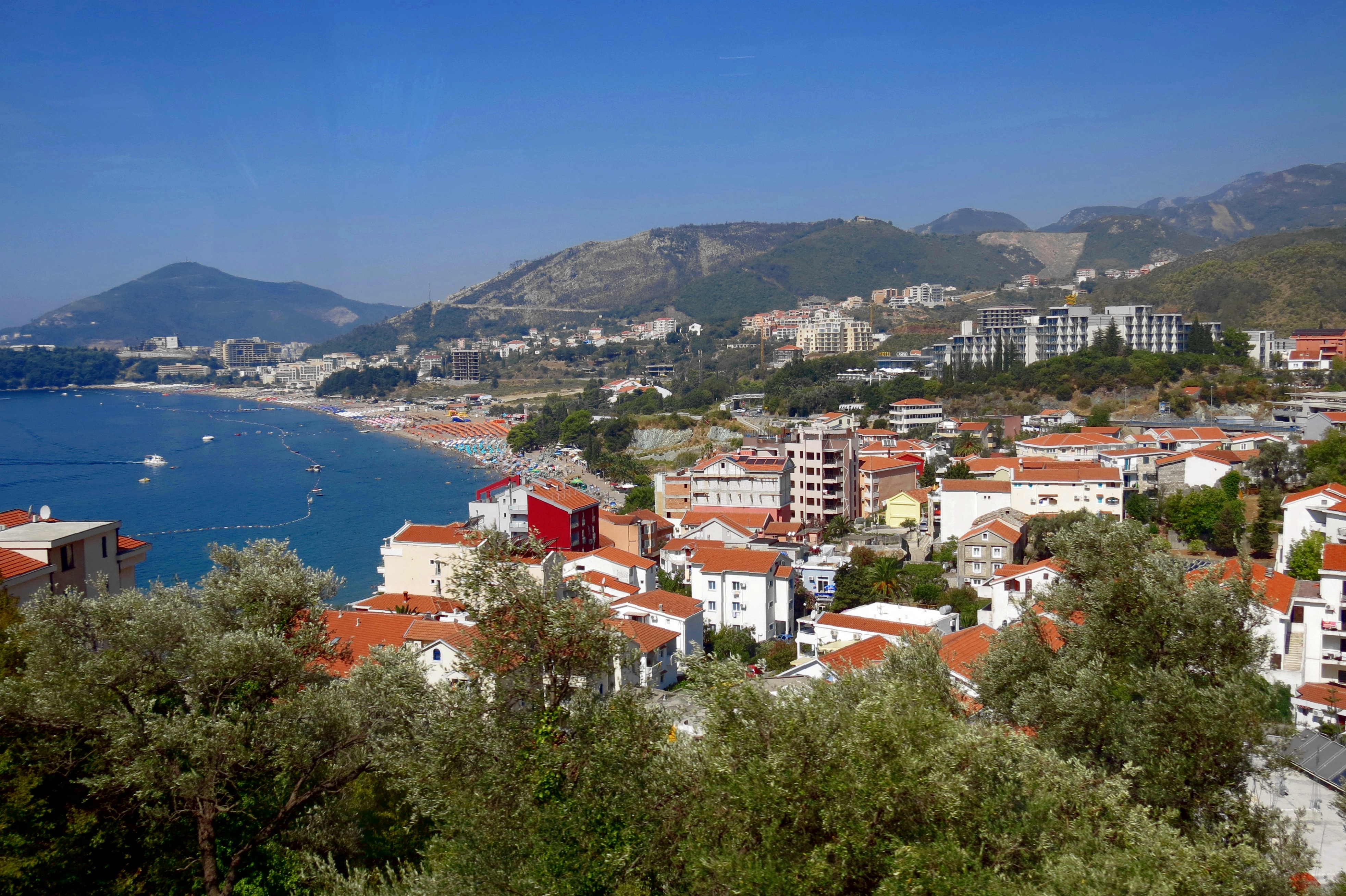 Becice-Budva. Побережье Бечичи-Будва.